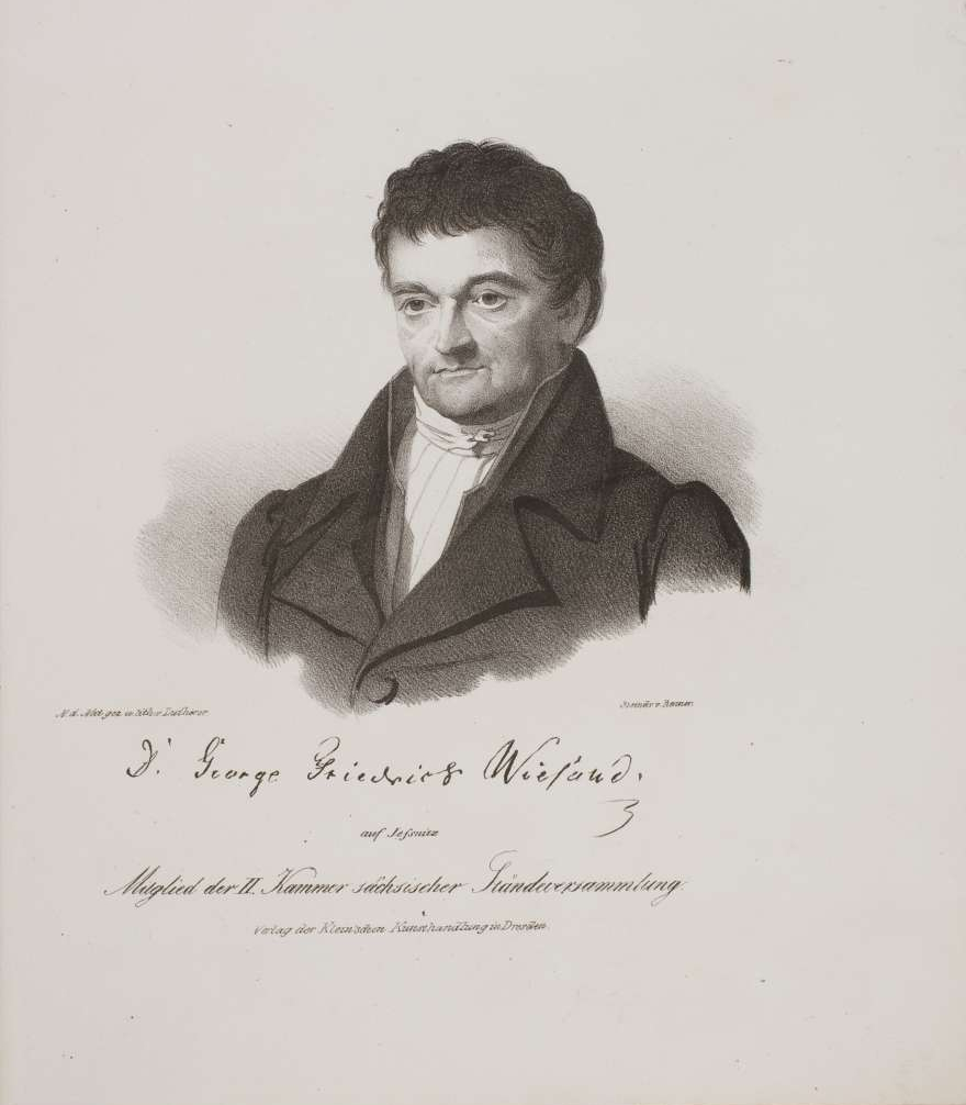 Jurist, Dr. jur. 1815, geb. zu Halle, Rentbeamter zu Lauchstädt, Kommissionsrat zu Dresden;Sohn des Georg Stephan Wiesand, 1777-1842